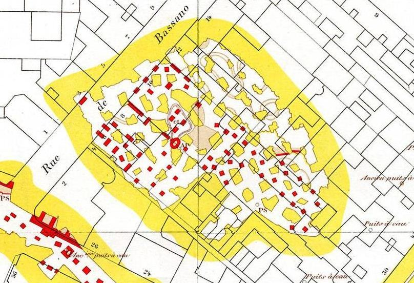 Planche de l'Inspection des Carrières de Paris (IGC). Pour plus d'informations